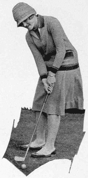 Maureen Orcutt